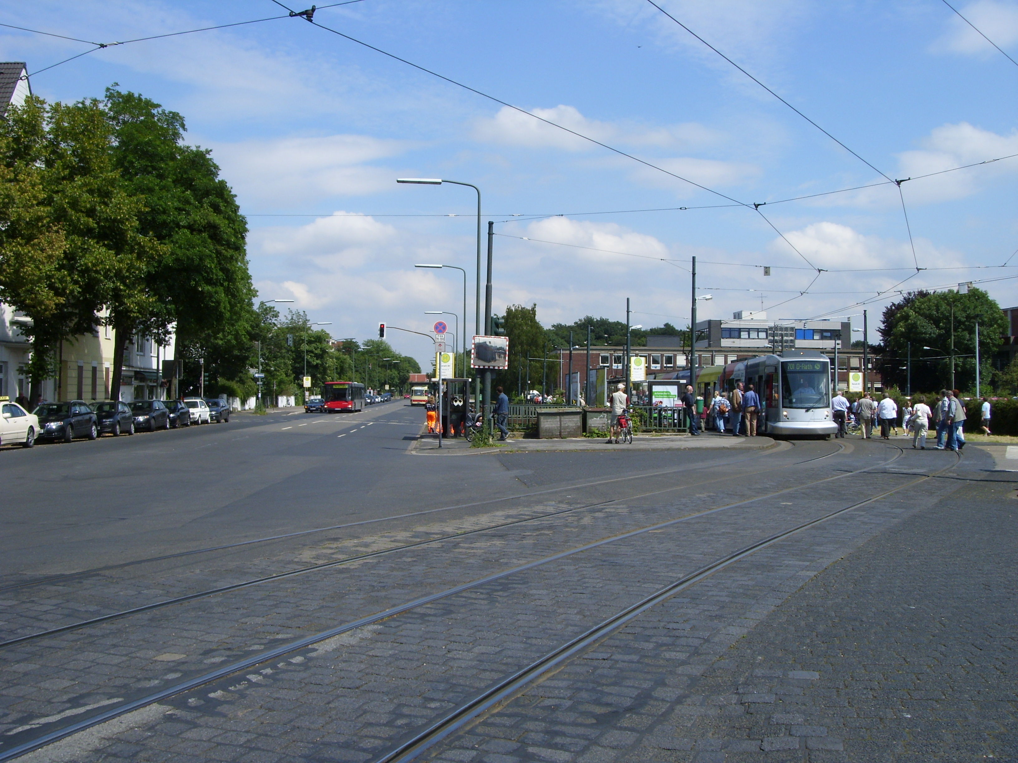 Straßenbahnschleife, Hildener Straße, Düsseldorf-Benrath, Deutschland.